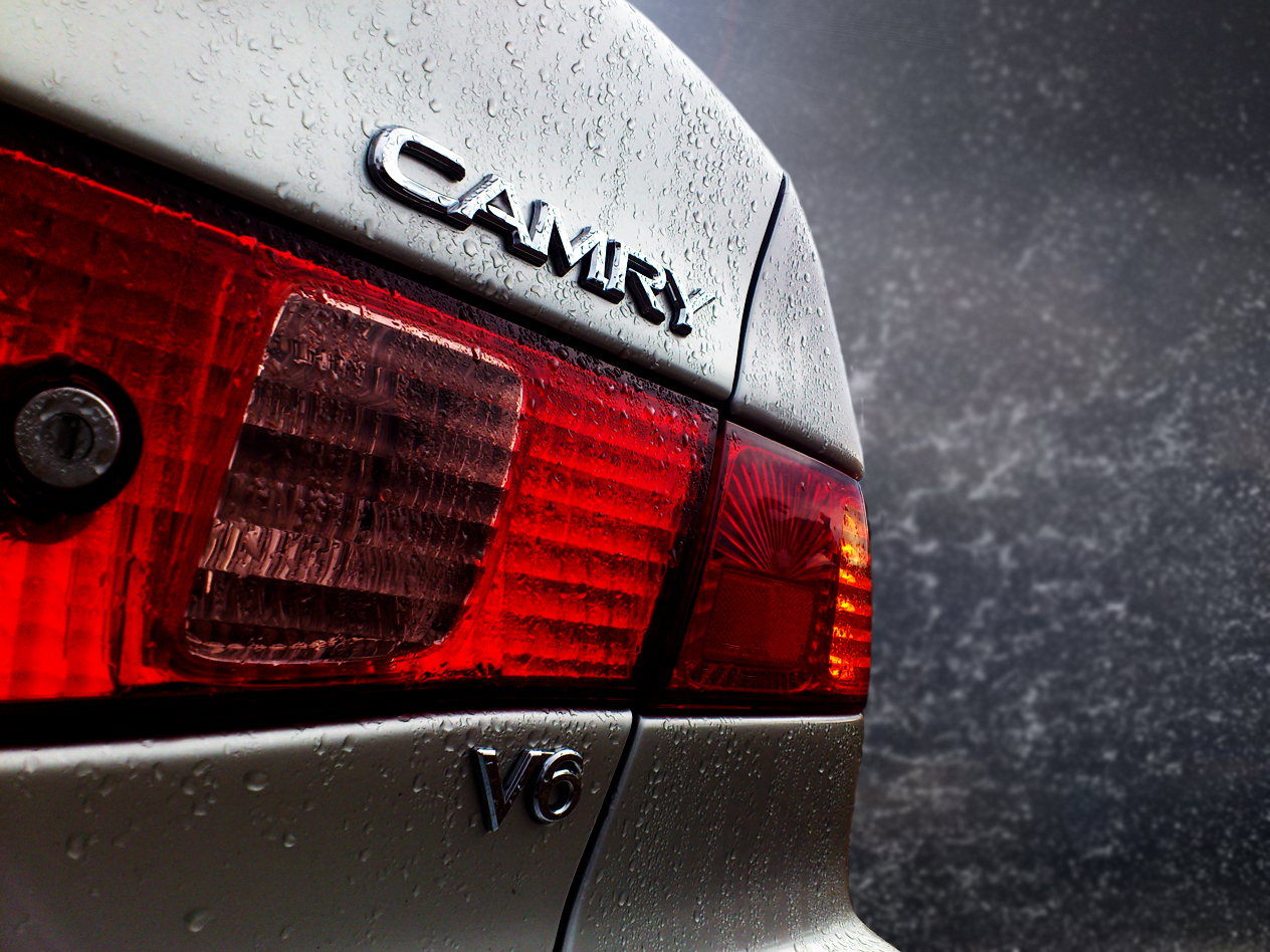 Bakljus på en Toyota Camry från 2000